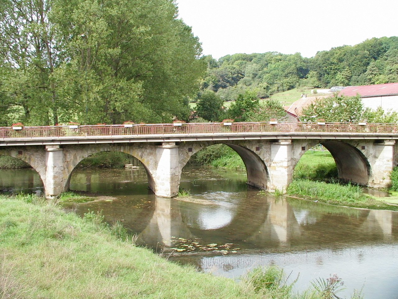 Pompierre (88), le pont de pierre sur le Mouzon Photo prise par F5ZV en 2005 Licensing Catégorie:Image de commune des Vosges